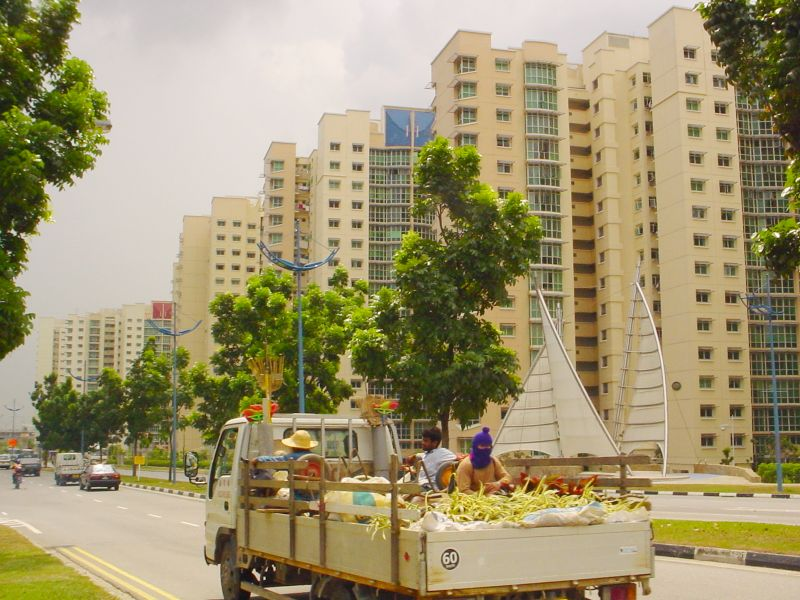 Punggol in Northern Singapore. By Timo Sippala 2002